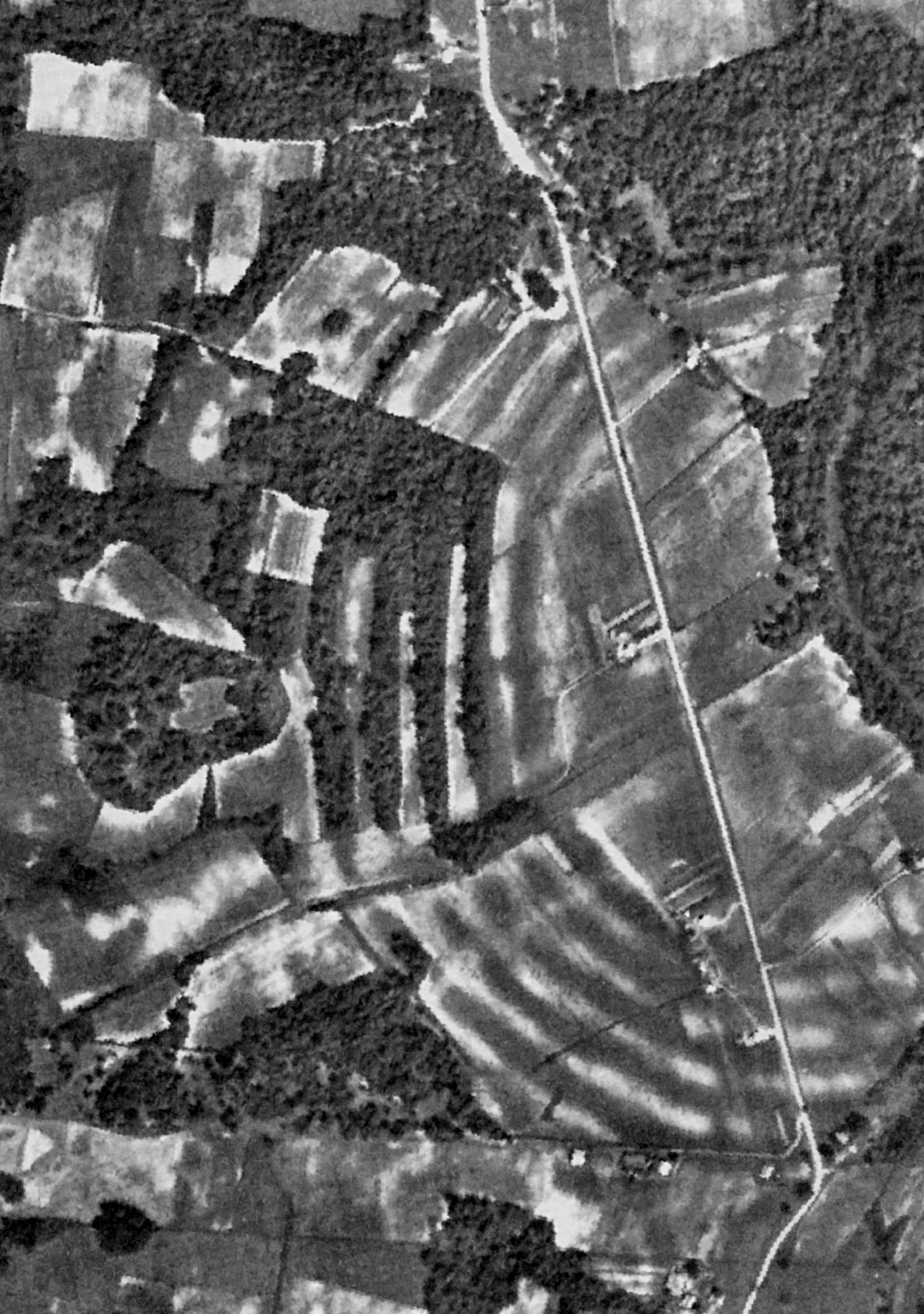 Aerial photograph of the Poverty Point site, Louisiana. Edited version. Original